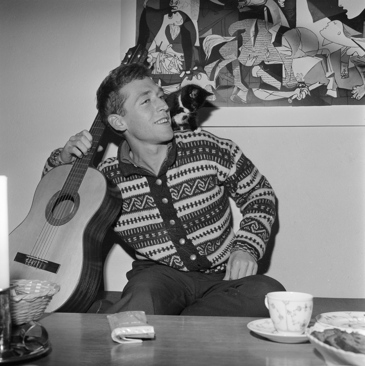 Alf Cranner (født 25. oktober 1936 i Oslo) er en norsk visesanger, låtskriver og billedkunstner. Han regnes av mange som foregangsmann for den norske visebølgen på 1960-tallet.